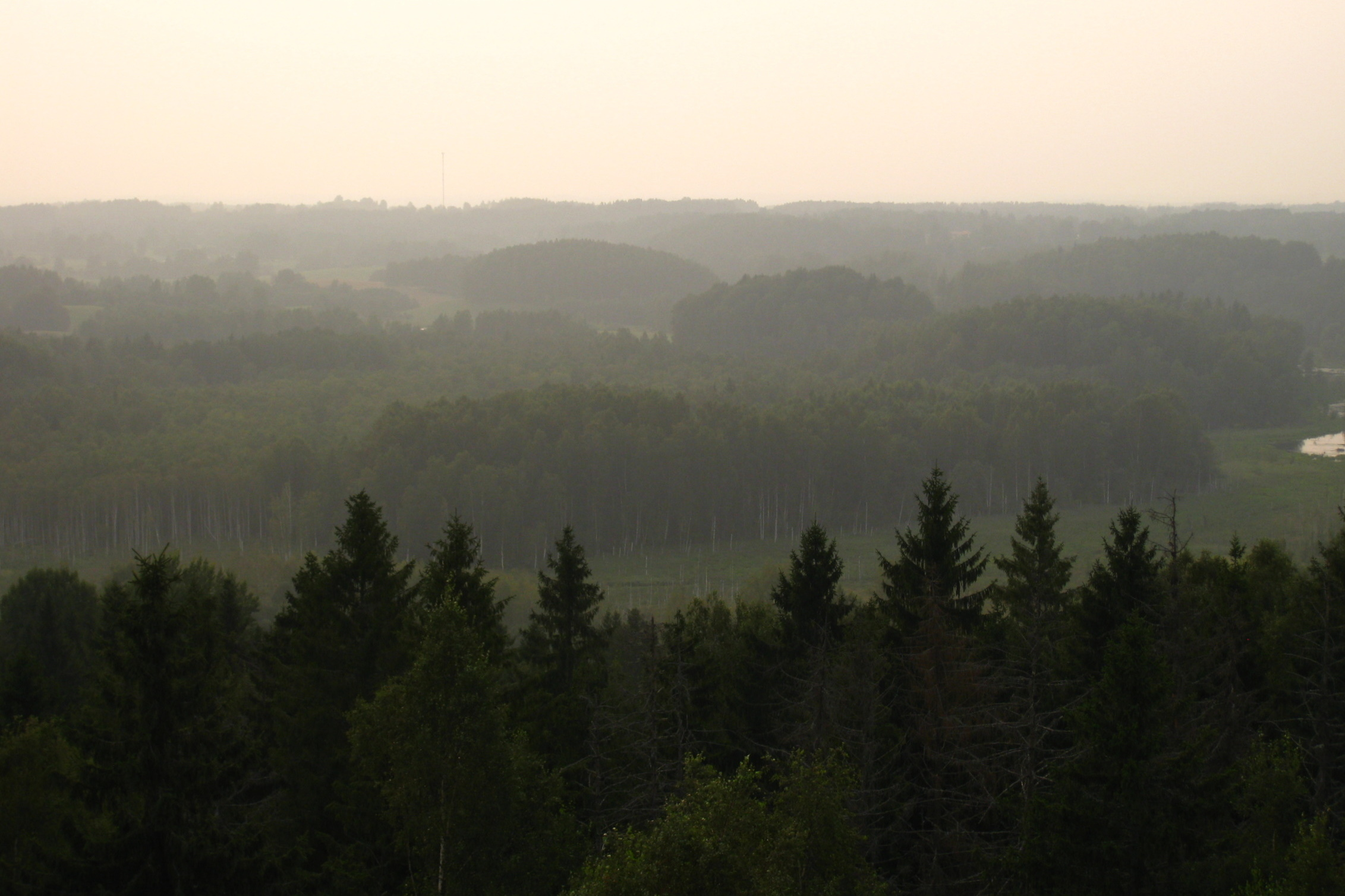 Vaade Karula rahvuspargis Tornimäe vaatetornist lõunasuunas